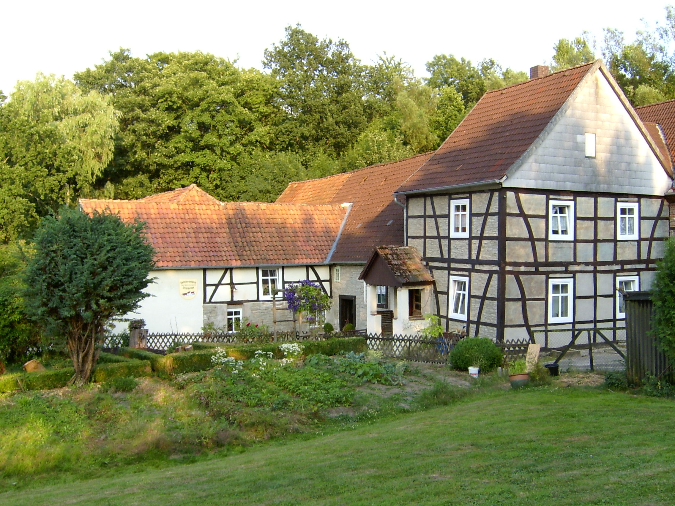 Blick auf die Paradiesmühle (nord-westlich)